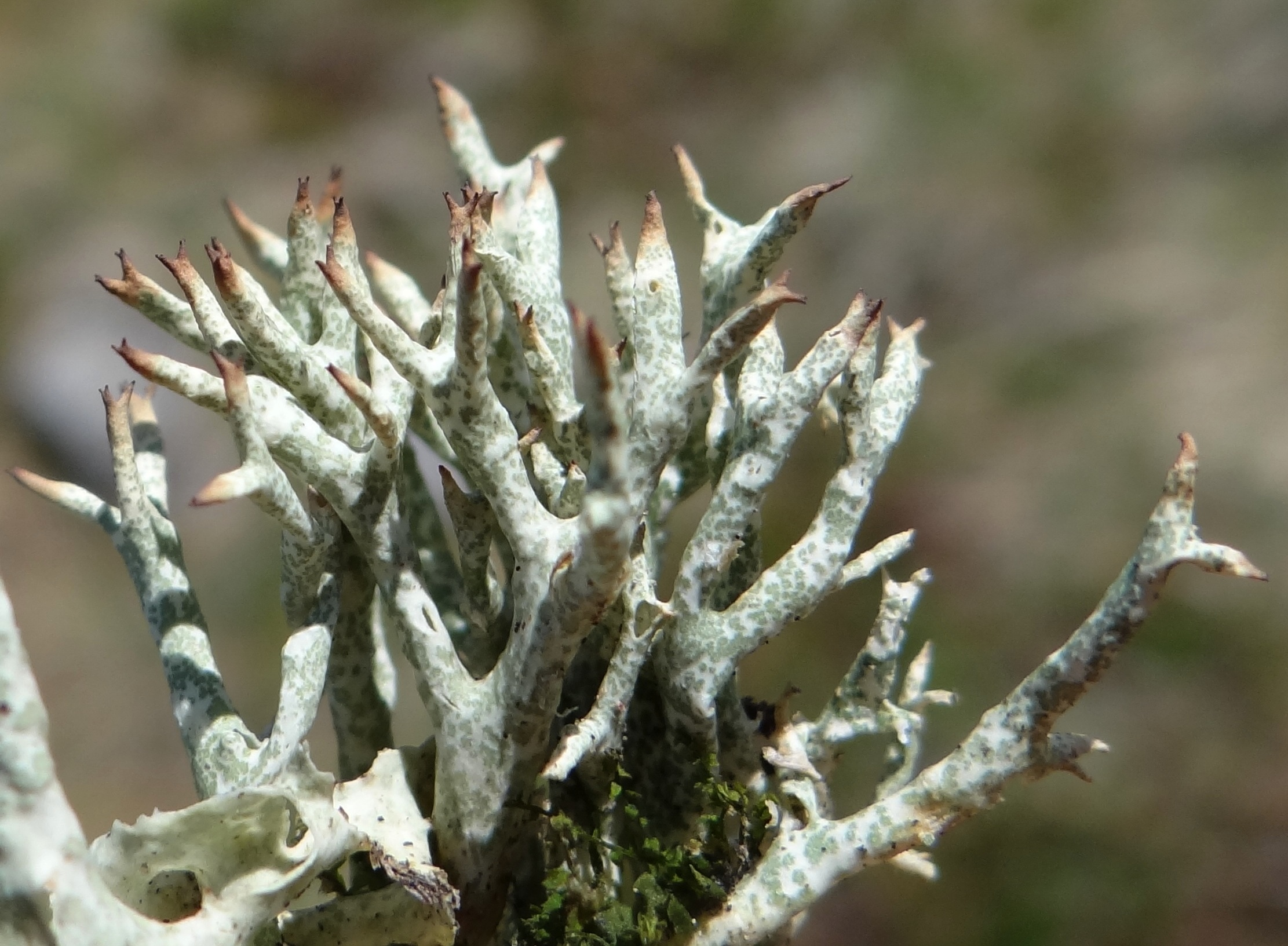 Cladonia uncialis (habitat:West Tatra Mountains)